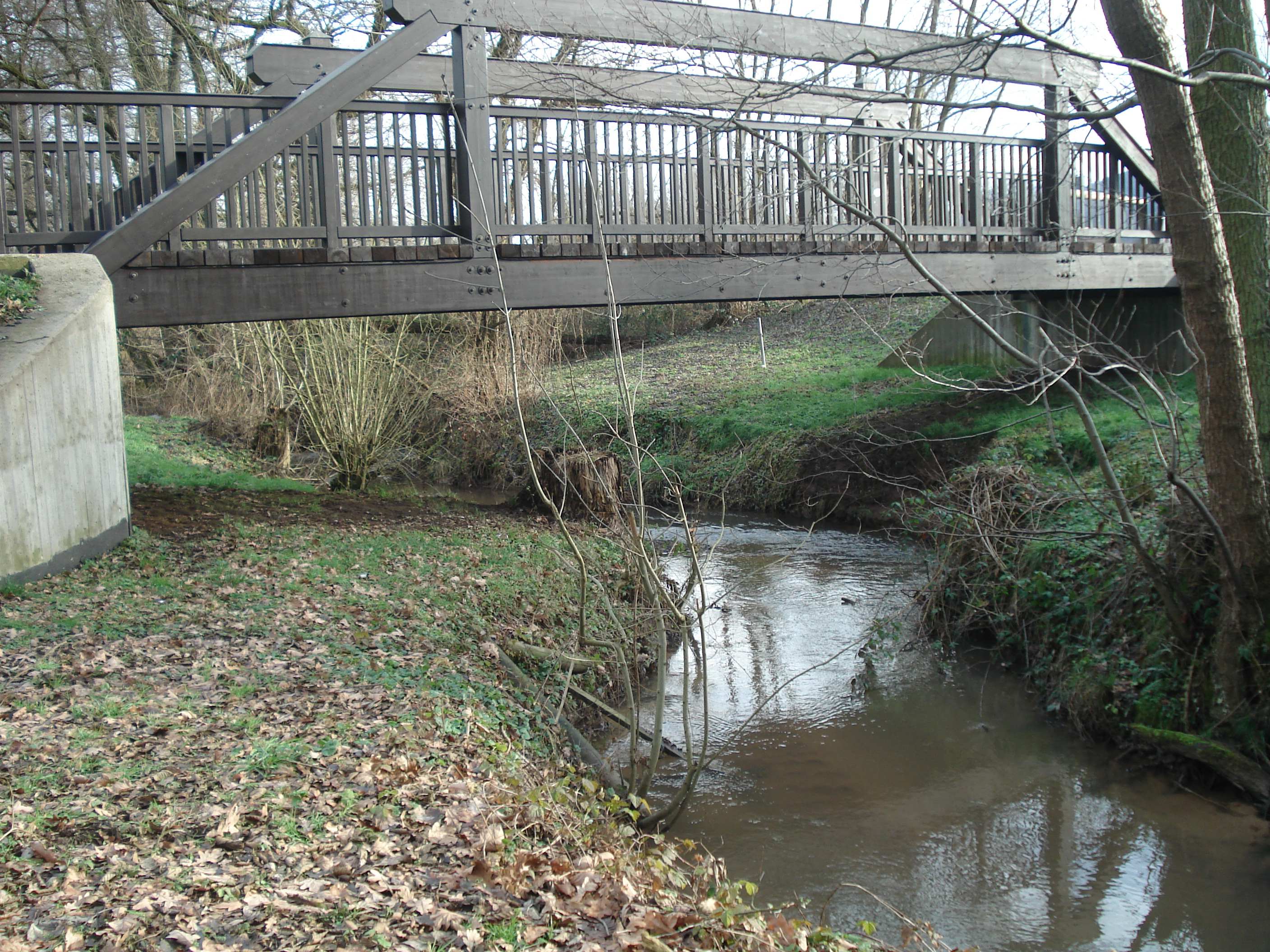 Der Sailaufbach bei Sailauf-Weyberhöfe